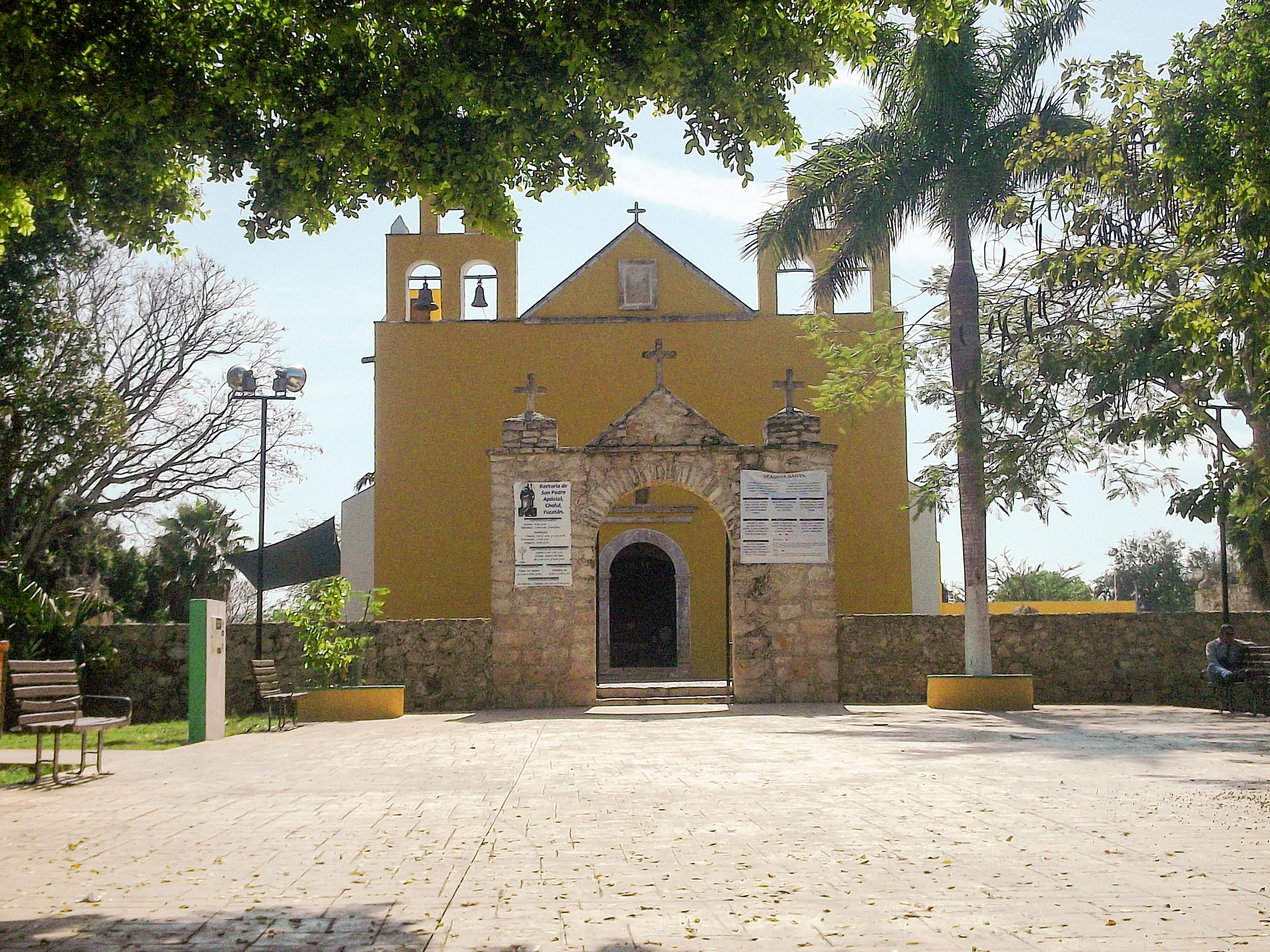 Iglesia de Cholul, Yucatán.